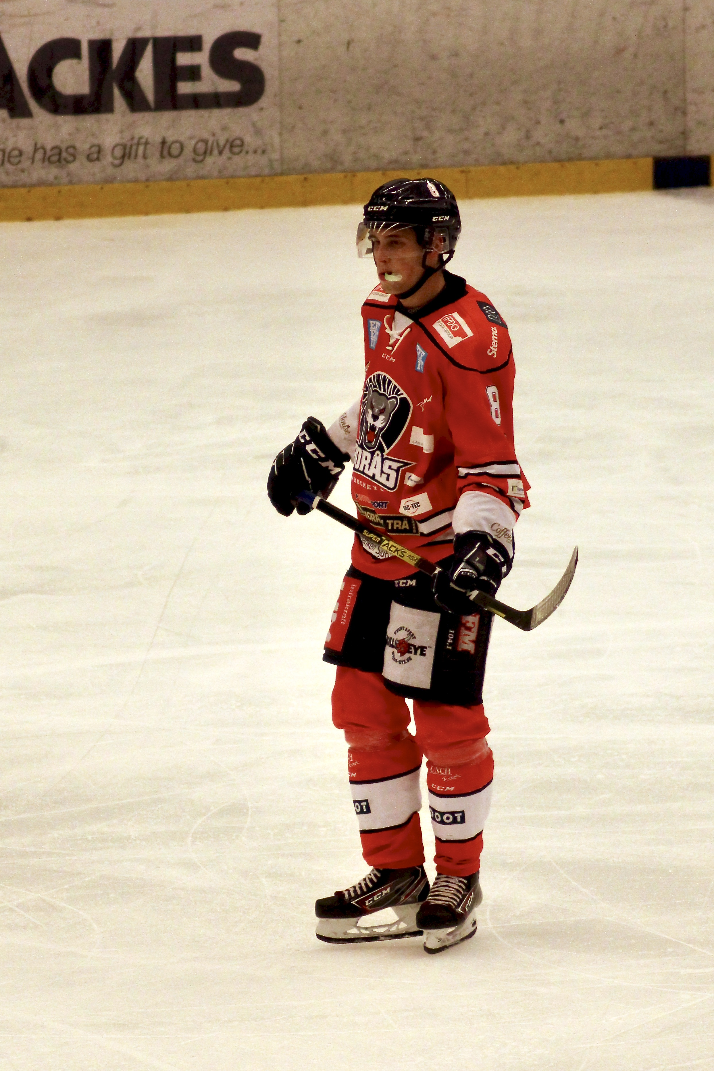 Ludvig Jansson i Borås Arena 6 november 2019. Match mellan Borås HC och Nybro Vikings IF.